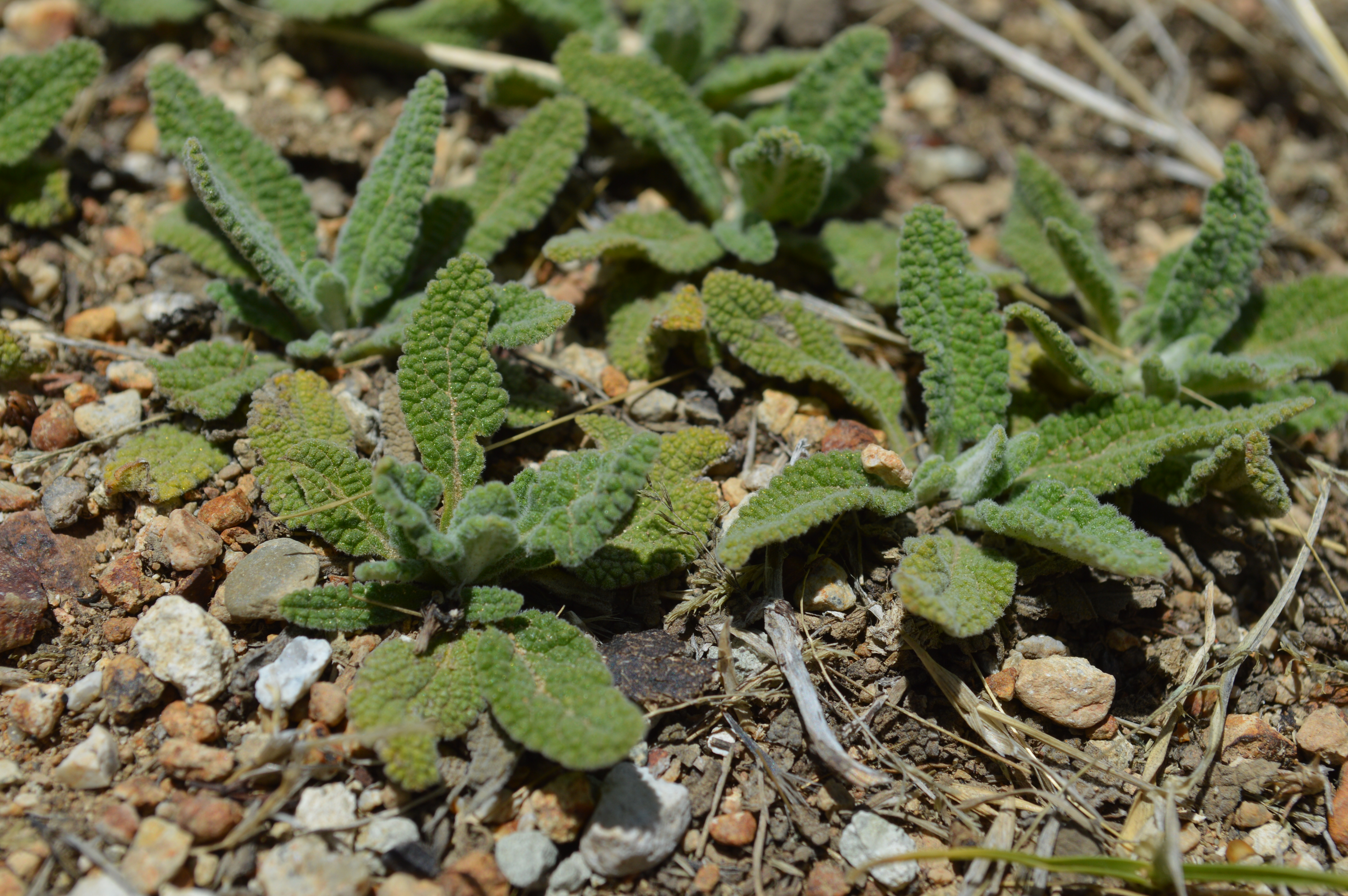 Pachasalvia (Lepechinia meyenii) cerca de la laguna Antacocha, provincia de Recuay en Áncash, Perú.